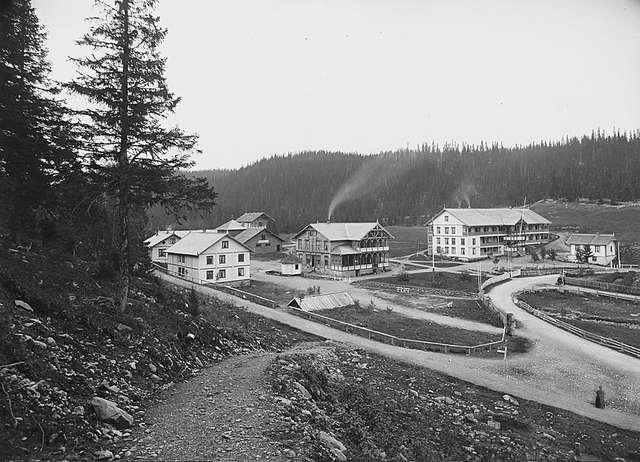 Tonsaasen Sanatorium på åsen mellom Bagn og Bruflat